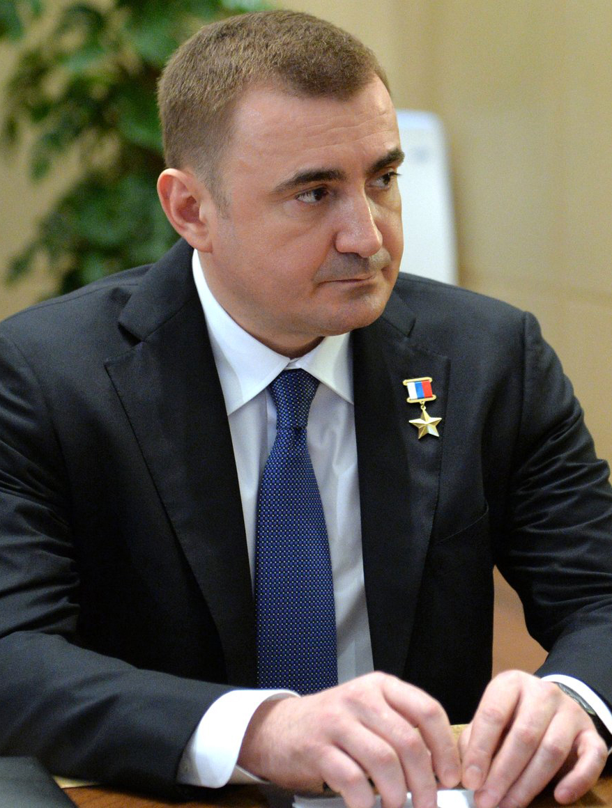 Алексей Дюмин во время встречи с Президентом России Владимиром Путиным